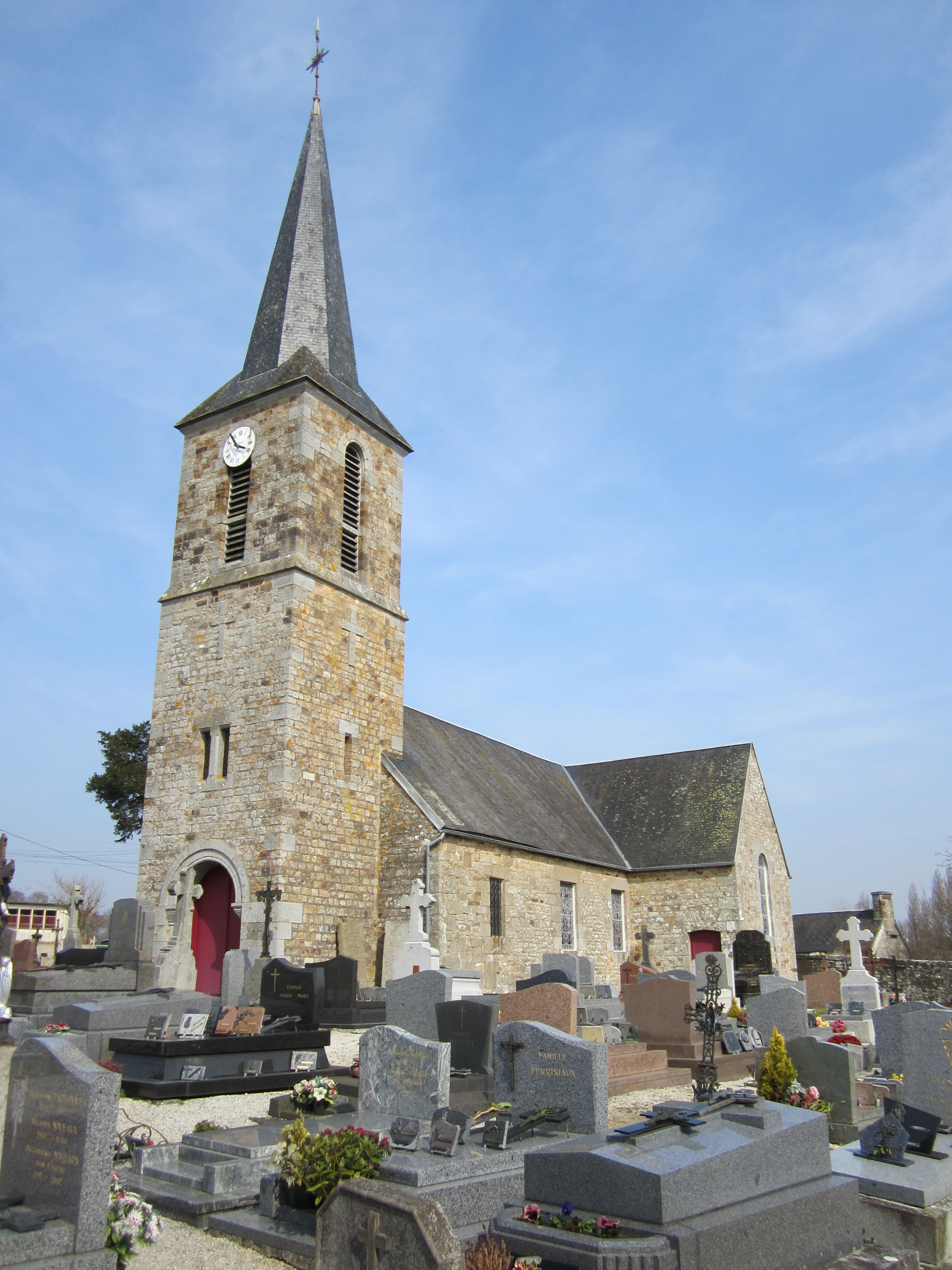 Église Notre-Dame-de-l'Assomption, Le Mesnil-Gilbert